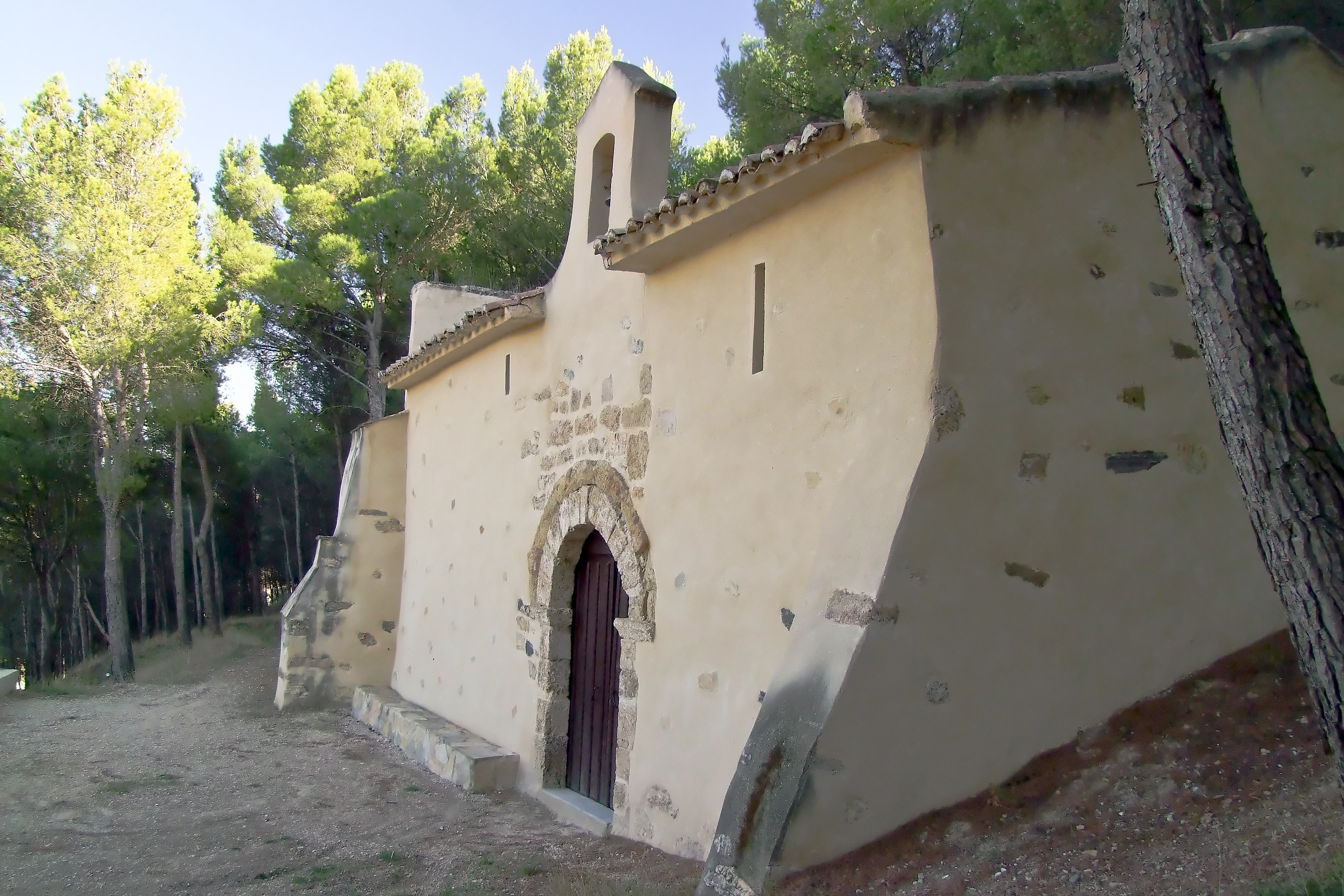 Ermita de la Antigua en la localidad de Aguilar del Rio Alhama, La Rioja - España